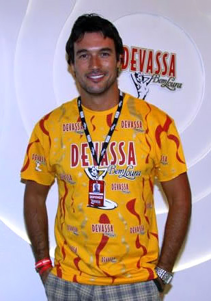 Os bastidores do carnaval do Rio de Janeiro no camarote Devassa 2011.